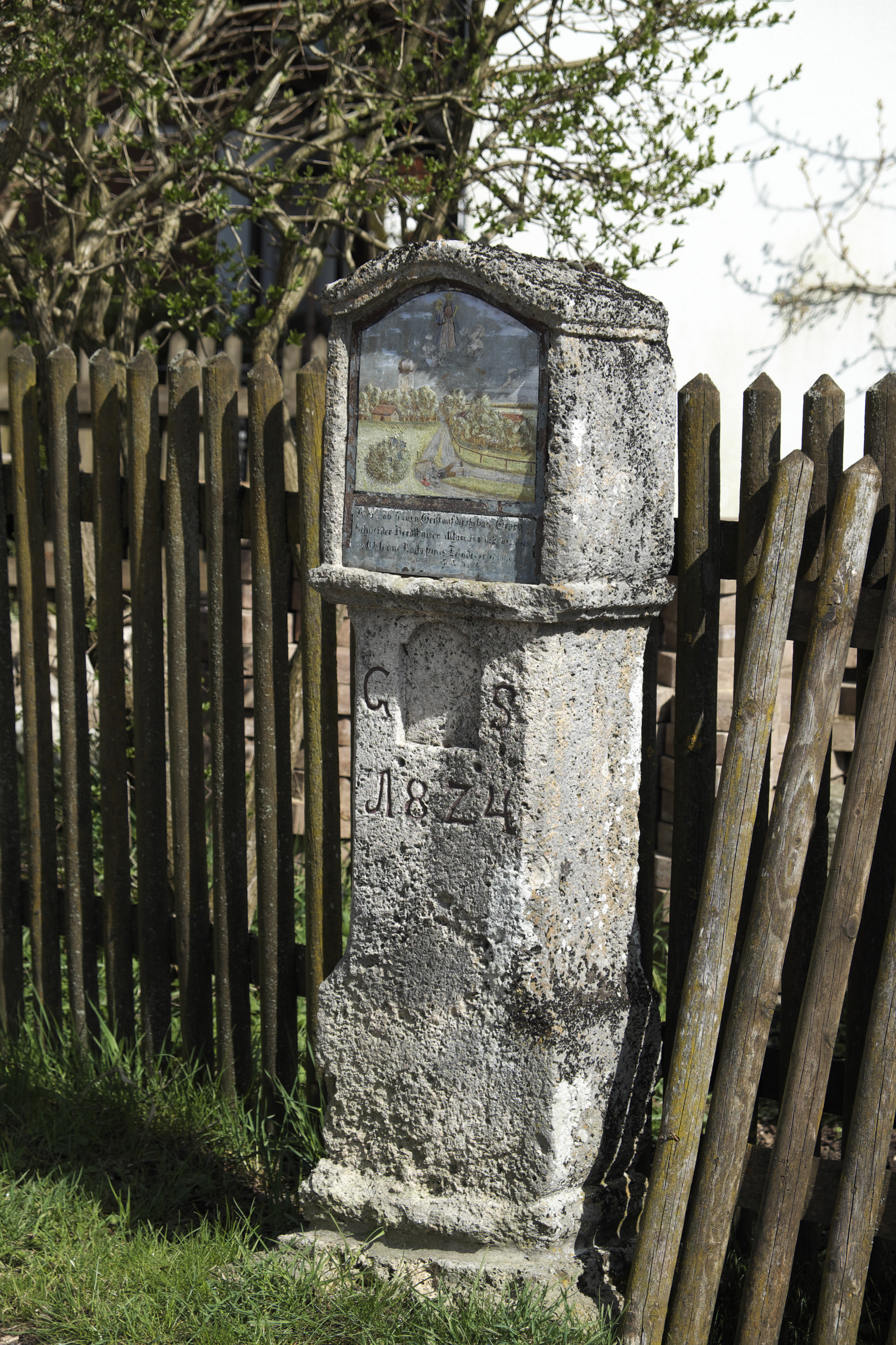 Bildstock in Aying im Landkreis München (Bayern/Deutschland)